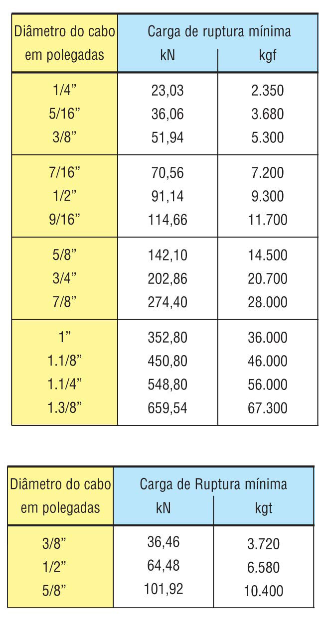 Tabela de Resistência